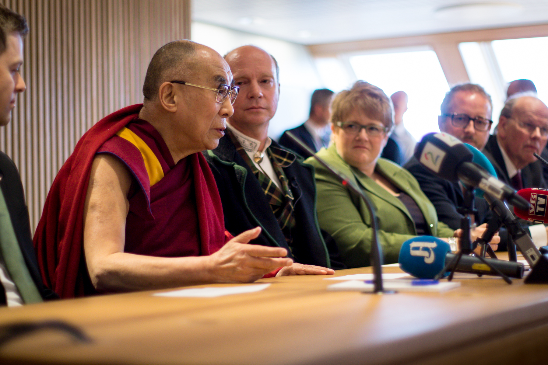 Foto: Monica Løvdahl